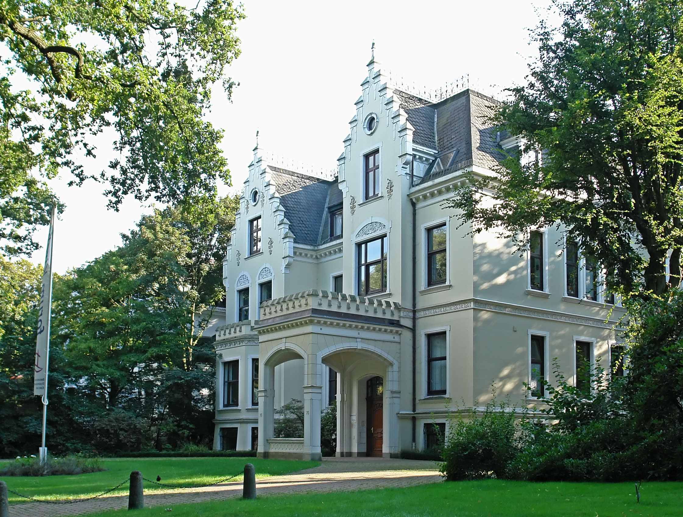 Villa Müller-Schall in Bremen, Hollerallee 75Das abgebildete Objekt ist ein geschütztes Kulturdenkmal in der Freien Hansestadt Bremen, mit der Nr. 0616 beim Landesamt für Denkmalpflege registriert.